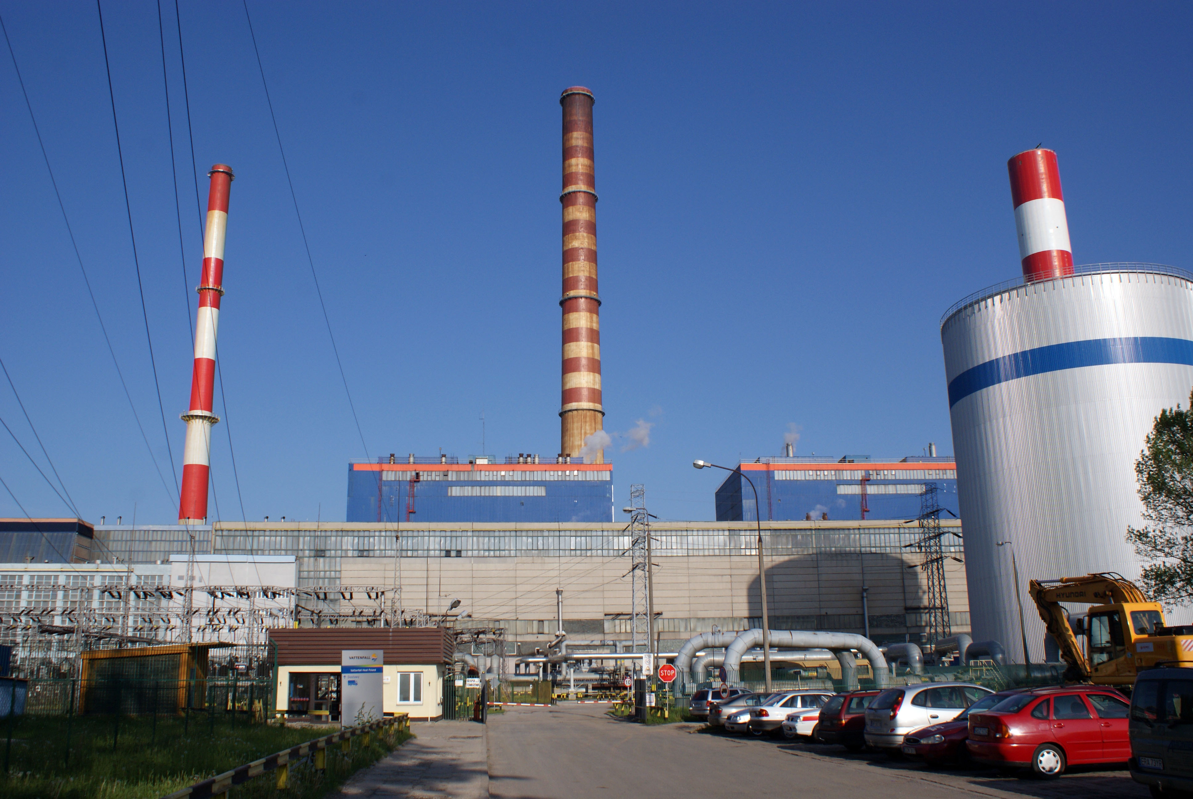 Brama główna elektrociepłowni Siekierki, Warszawa. Po prawej stronie akumulator ciepła.